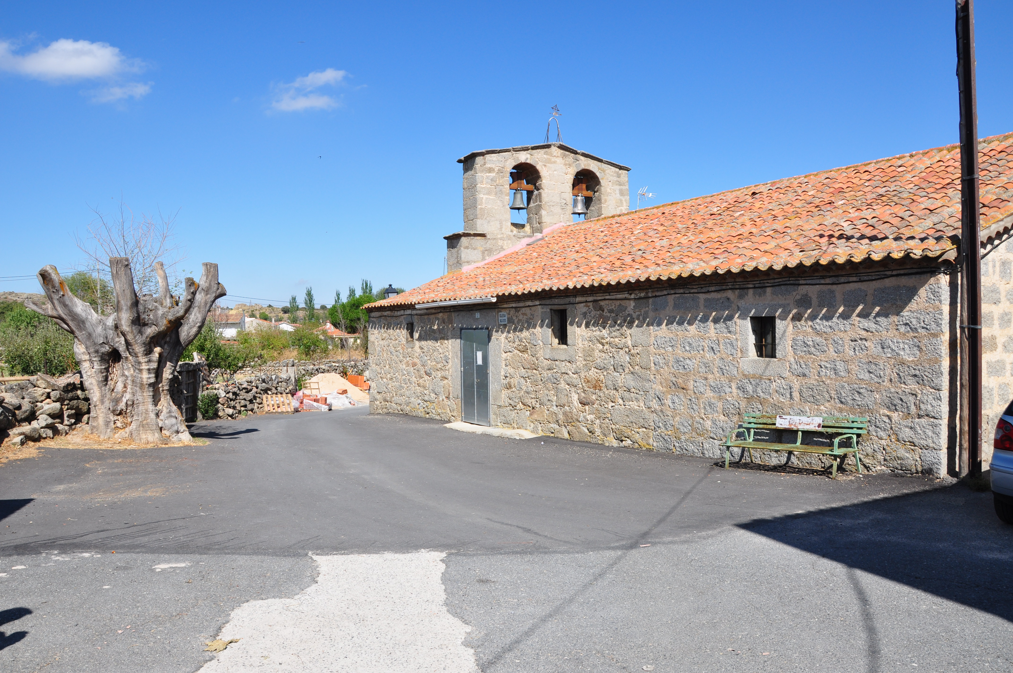 Iglesia de la Inmaculada en Chamartín de la Sierra (Ávila), España. Olmo-negrillo seco frente a la iglesia.